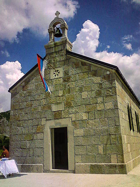 Храм светог цара Константина и царице Јелене у Слату код Невесиња